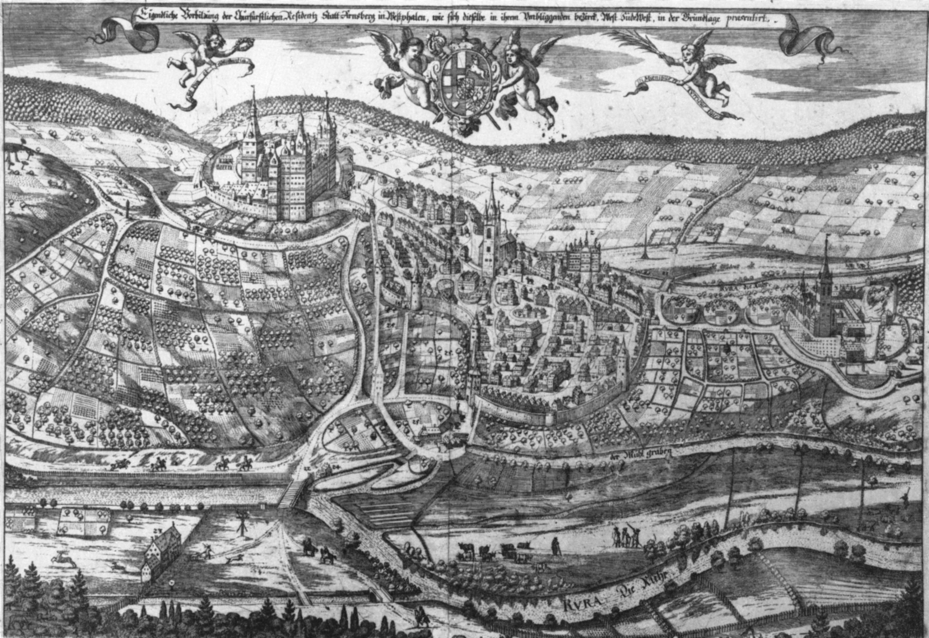 Darstellung der Stadt Arnsberg, Schloss Arnsberg und Kloster Wedinghausen